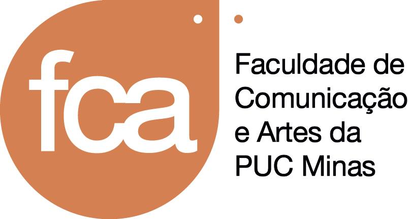 Logo representativa da Faculdade de Comunicação e Artes da Pontifícia Universidade Católica de Minas Gerais